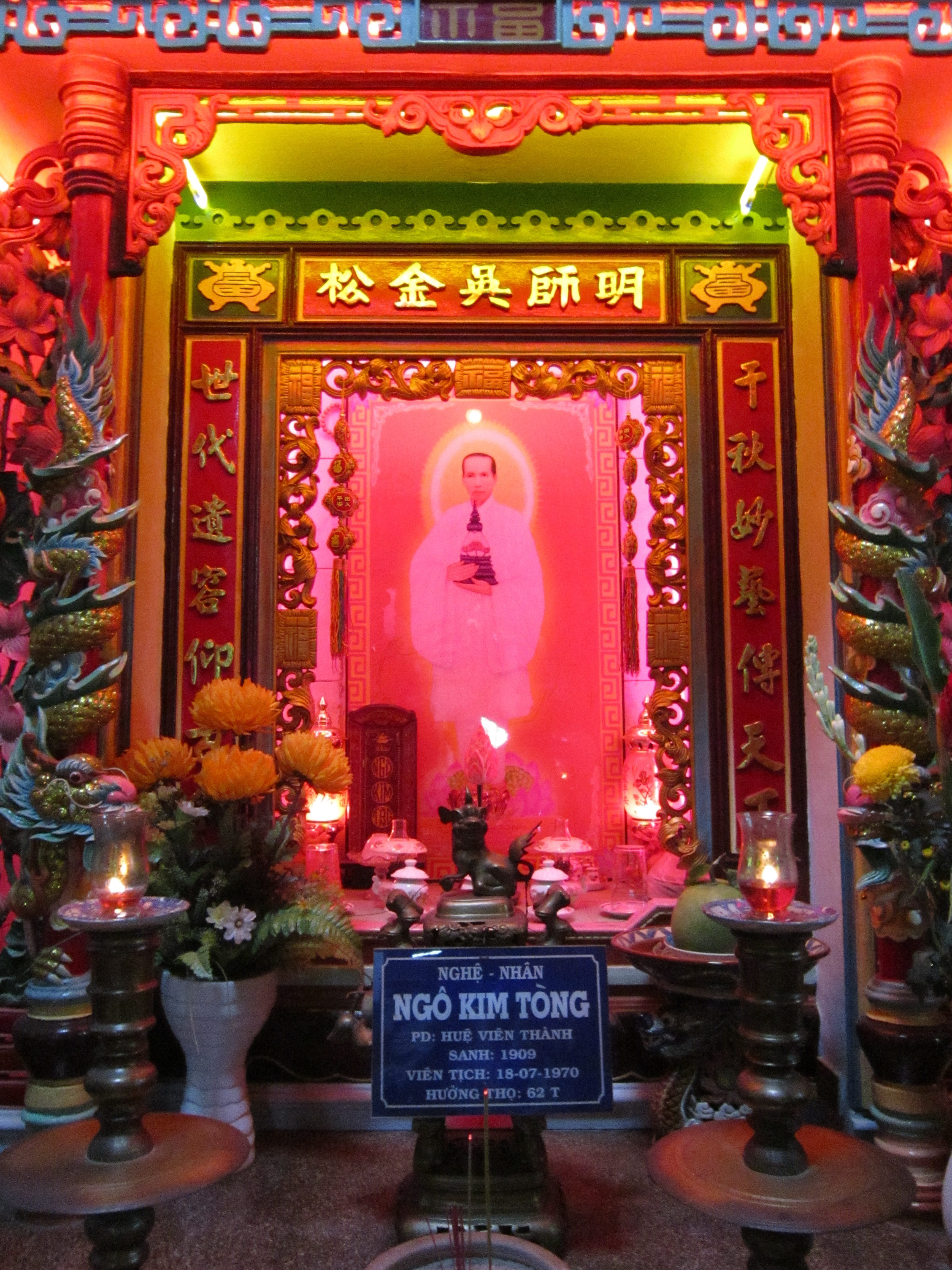 Bàn thờ Ngô Kim Tòng (1909 – 1970) người làm ra đèn cầy lớn và các hiện vật bằng đất sét trong chùa Bửu Sơn; tọa lạc ở phường 5, TP. Sóc Trăng (Sóc Trăng, Việt Nam).